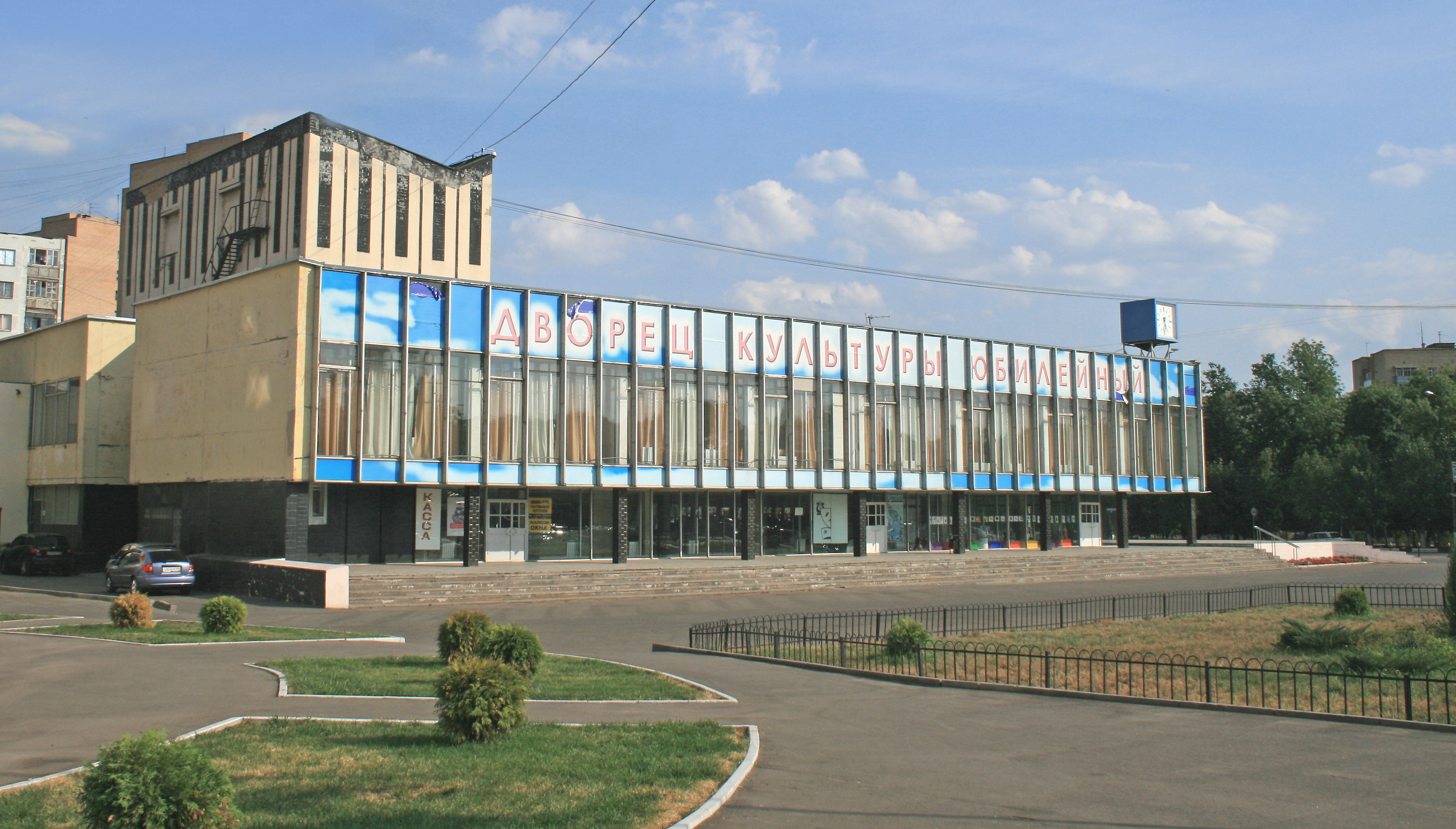 Дворец культуры «Юбилейный», город Ивантеевка.